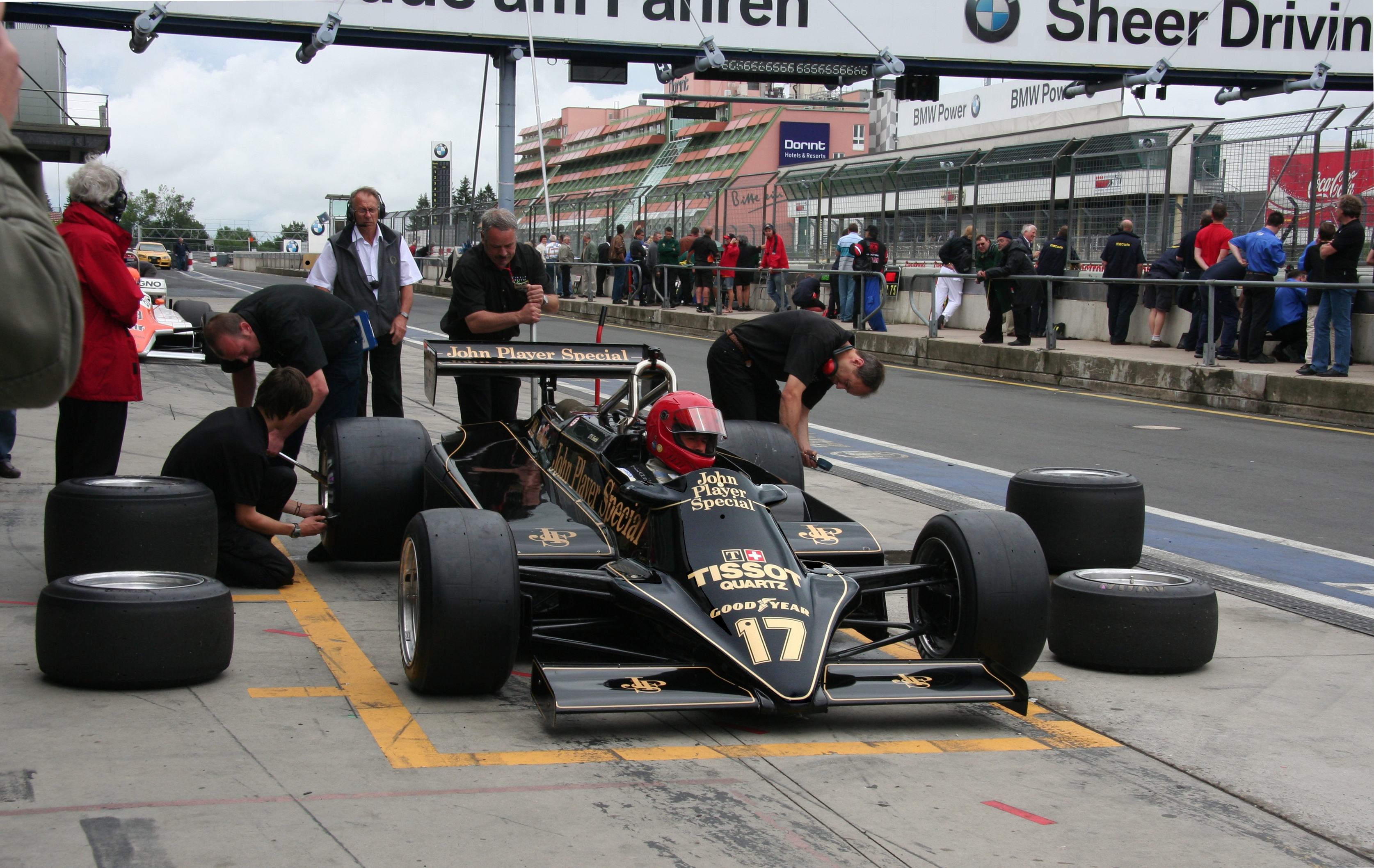 Lotus 87B von 1982 beim Oldtimer Festival des DAMC an den Boxen des Nürburgrings